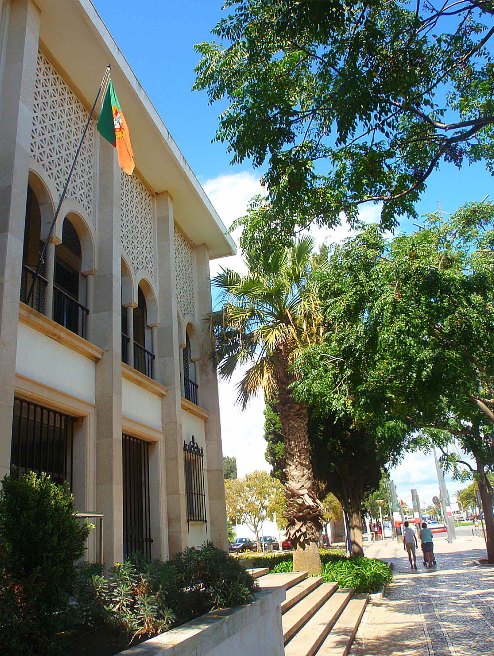 Lagos (Portugal)